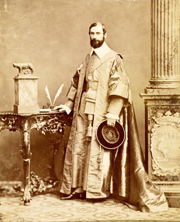 l marchese Cavalletti fu l’ultimo esponente della municipalità romana di epoca pontificia; qui è ritratto il giorno della sua investitura, nel 1865. Il senatore rimase in carica fino al 1870.